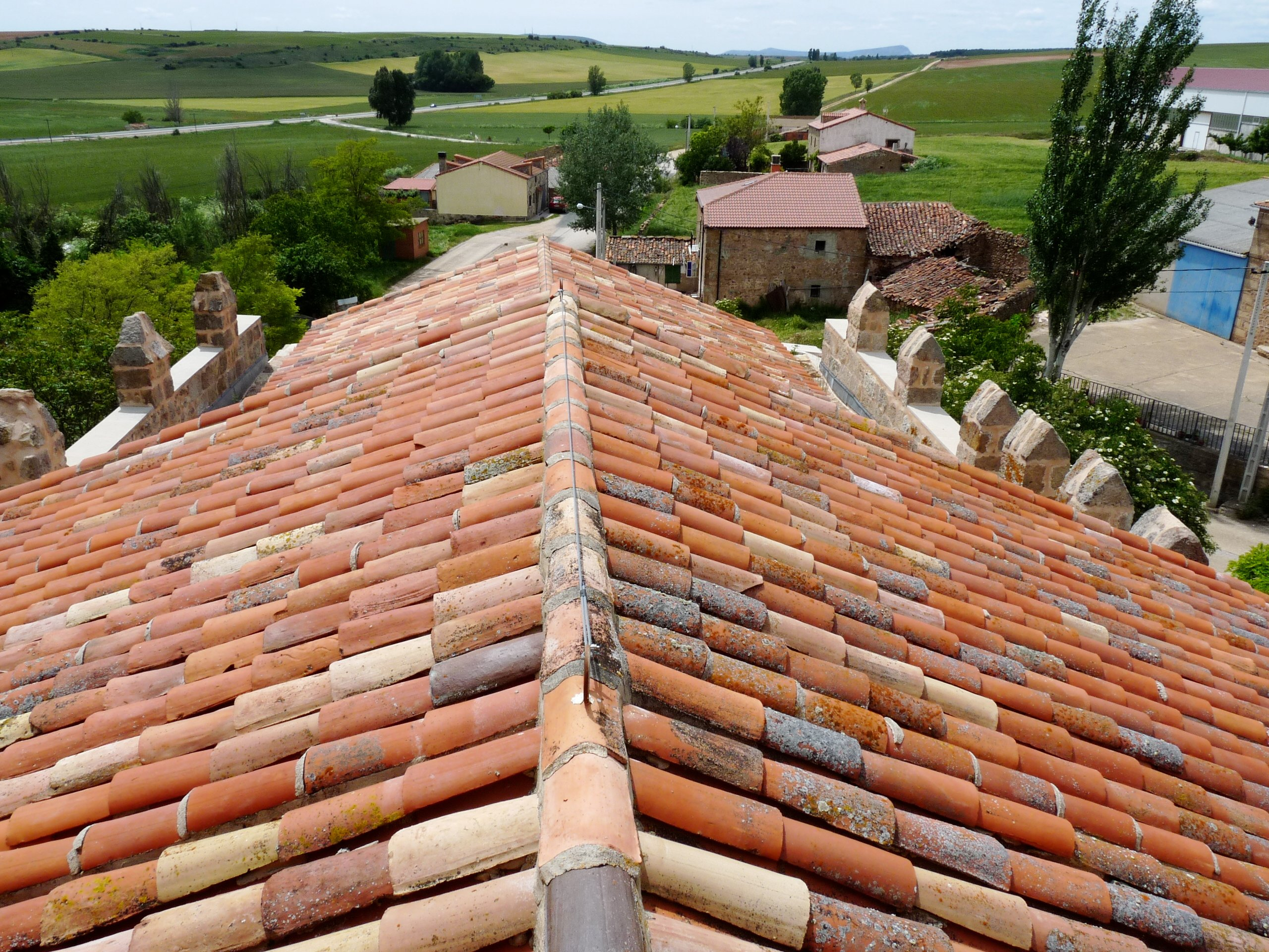 Fuensaúco - Iglesia de Nuestra Señora de los Ángeles s. XIII - Tejado con almenas